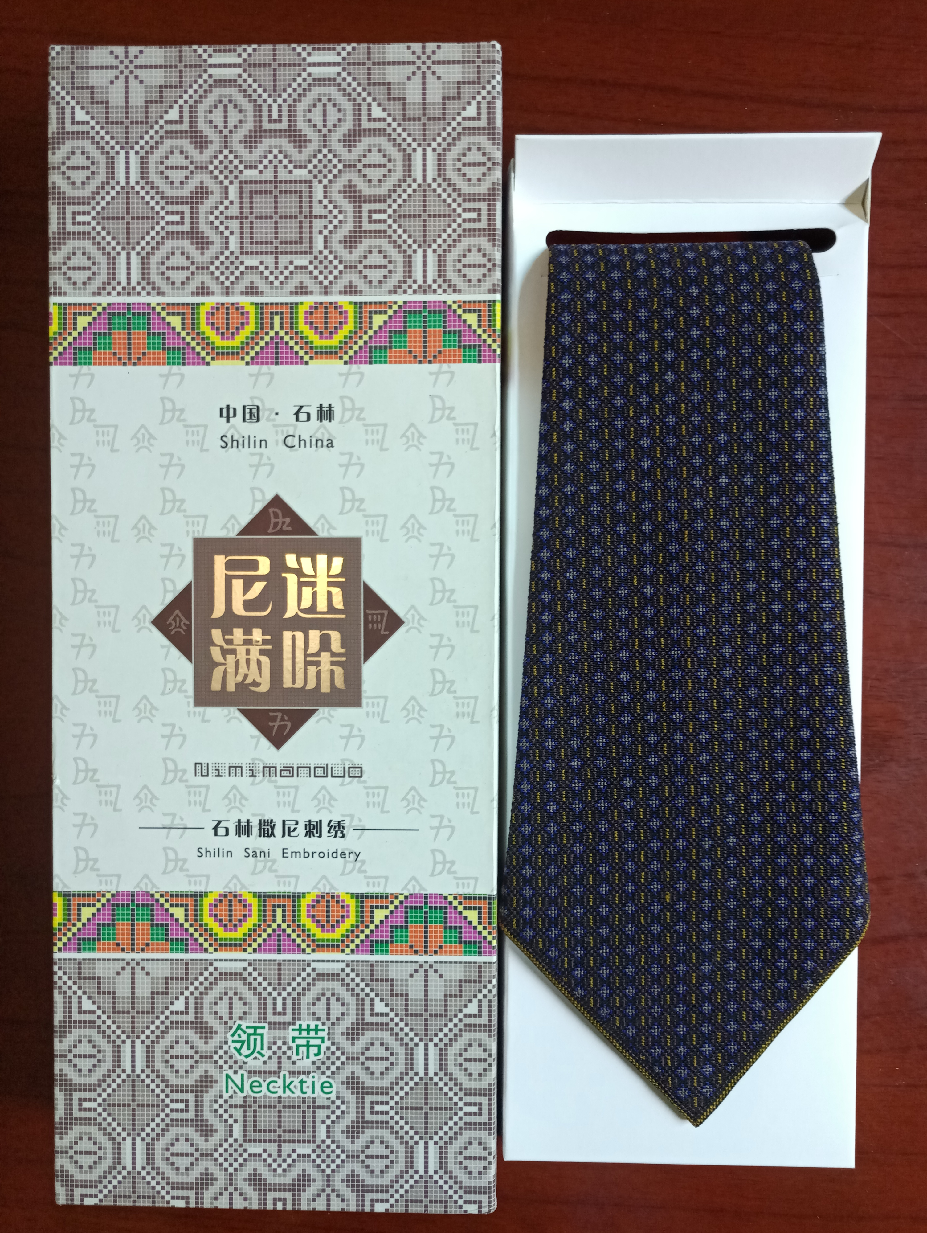 中文（中国大陆）: 石林撒尼刺绣工艺的一条领带